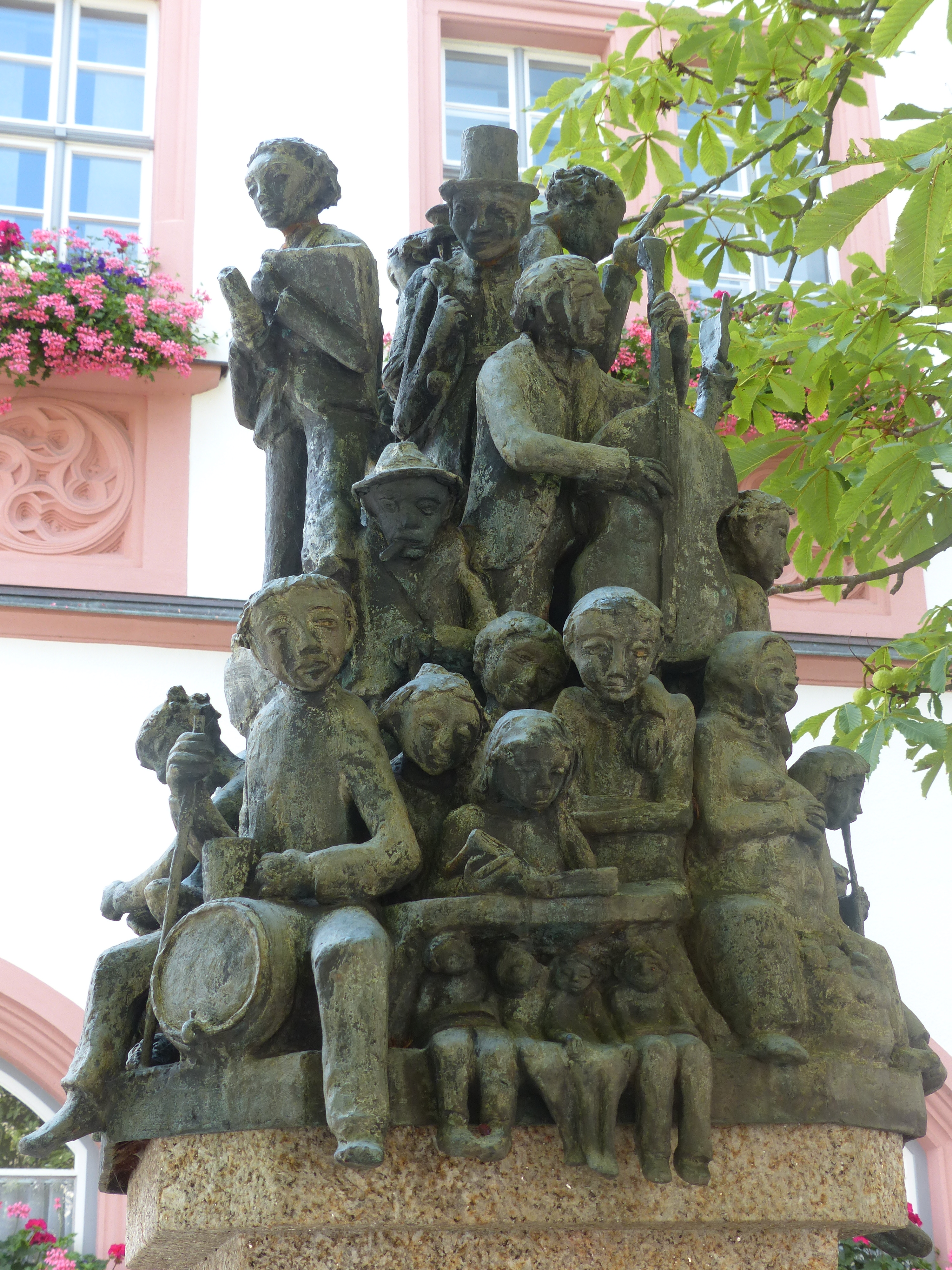 Brunnen von Margarete Wiggen in der Stadt Hof